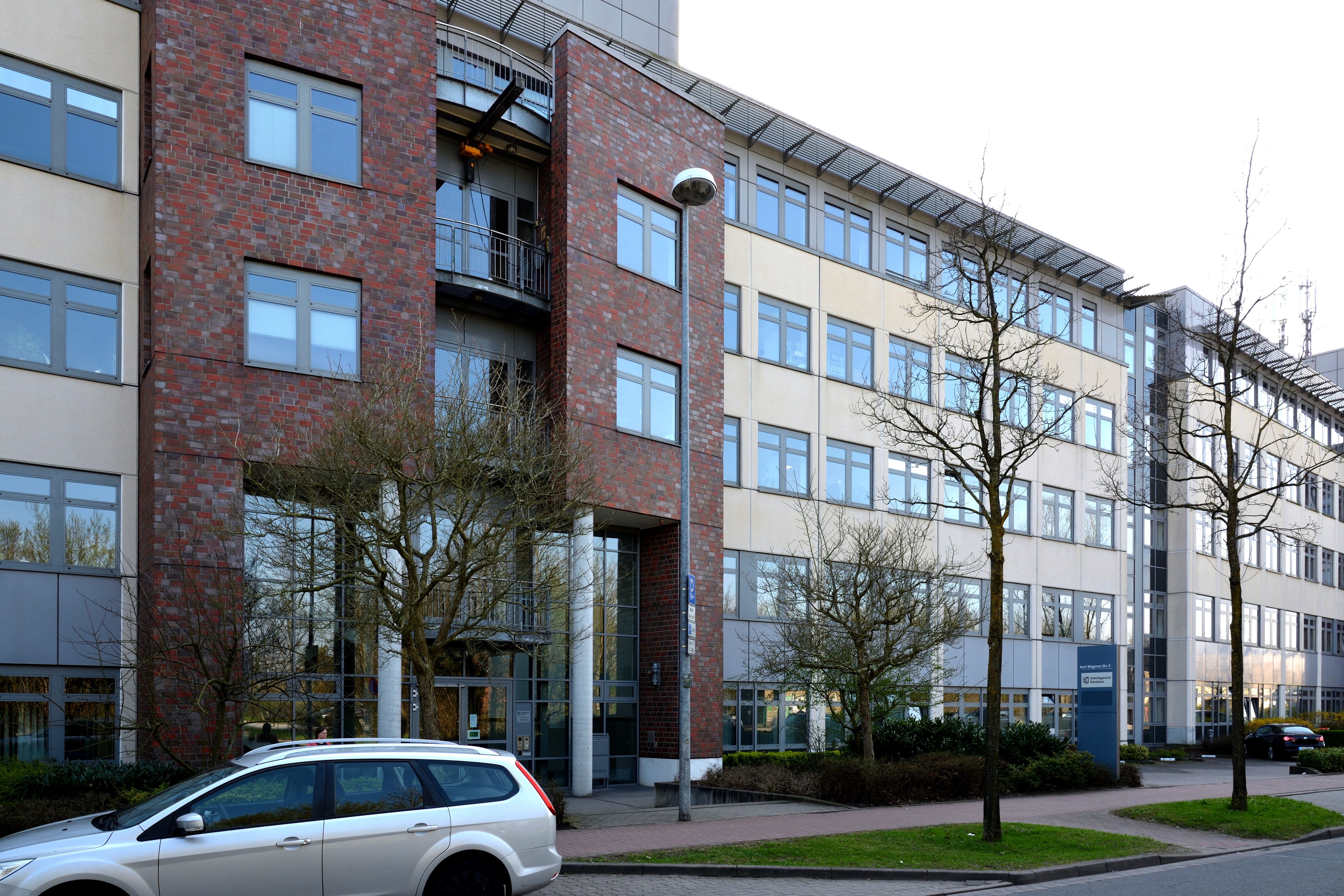 Das Arbeitsgericht in Elmshorn, Kurt-Wagener Straße 9. im ehemaligen Talkline-Gebäude